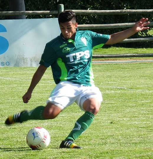 Fotografía de Luis García, jugador de fútbol profesional, perteneciente al Santiago Wanderers de Chile